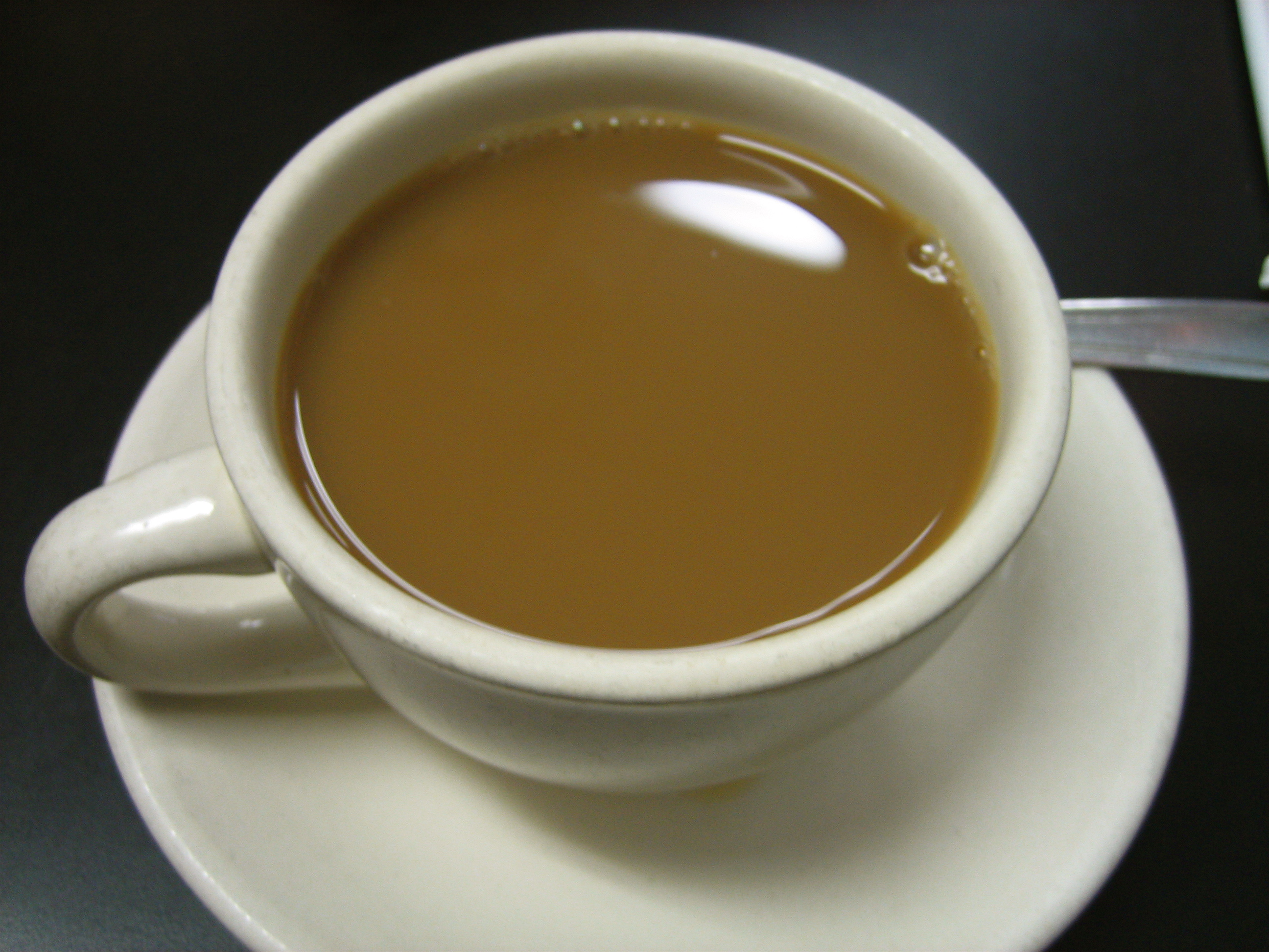 Café au laitCoffee